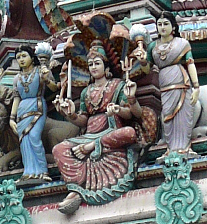 Mariamman, Singapore - Sri Mariamman Temple